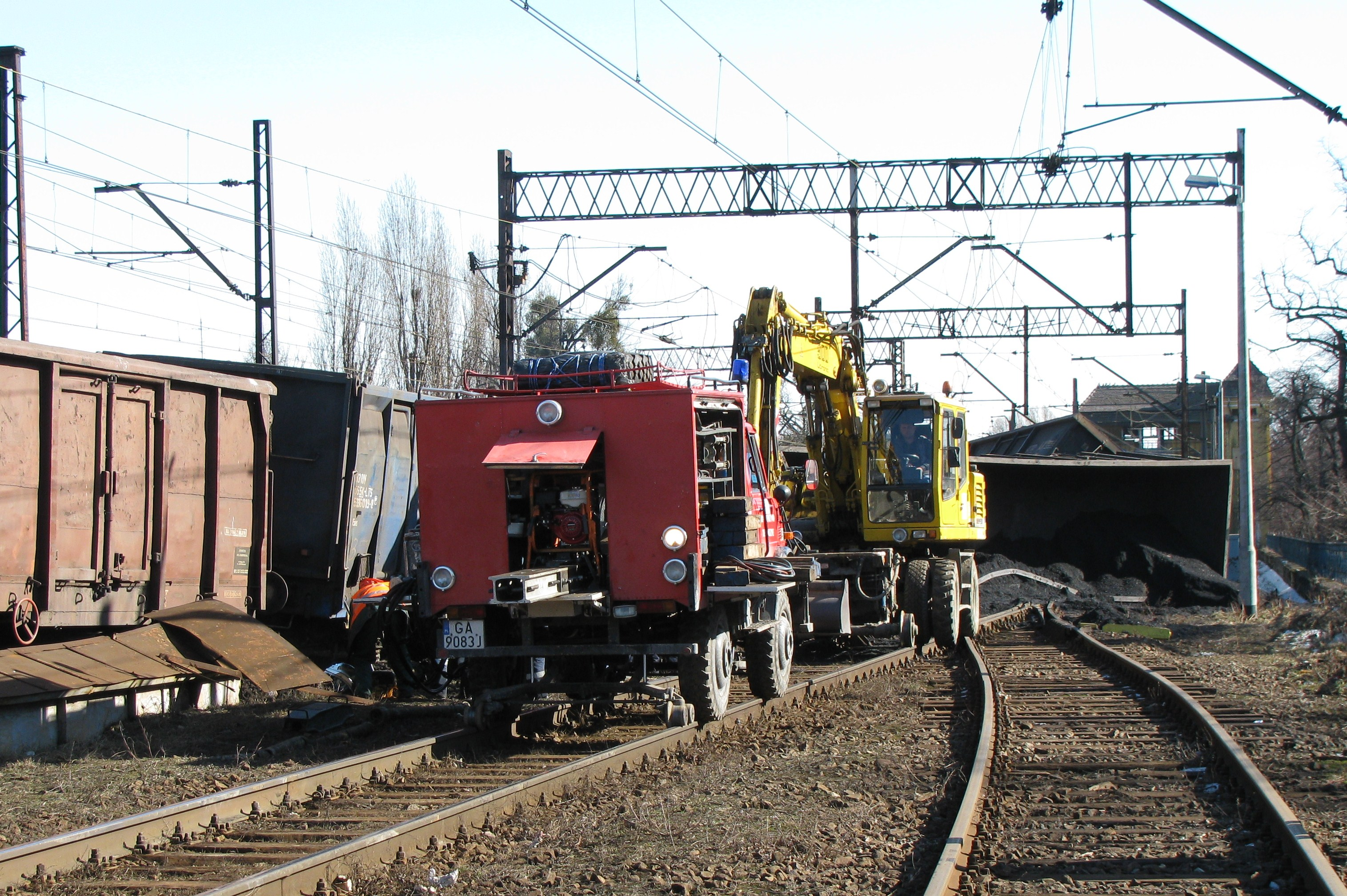 Wykolejony pociąg towarowy w Gdańsku Wrzeszczu, sfotografowany 7 marca 2011. Wykolejenie nastąpiło wieczorem, 6 marca 2011. Bez ofiar.